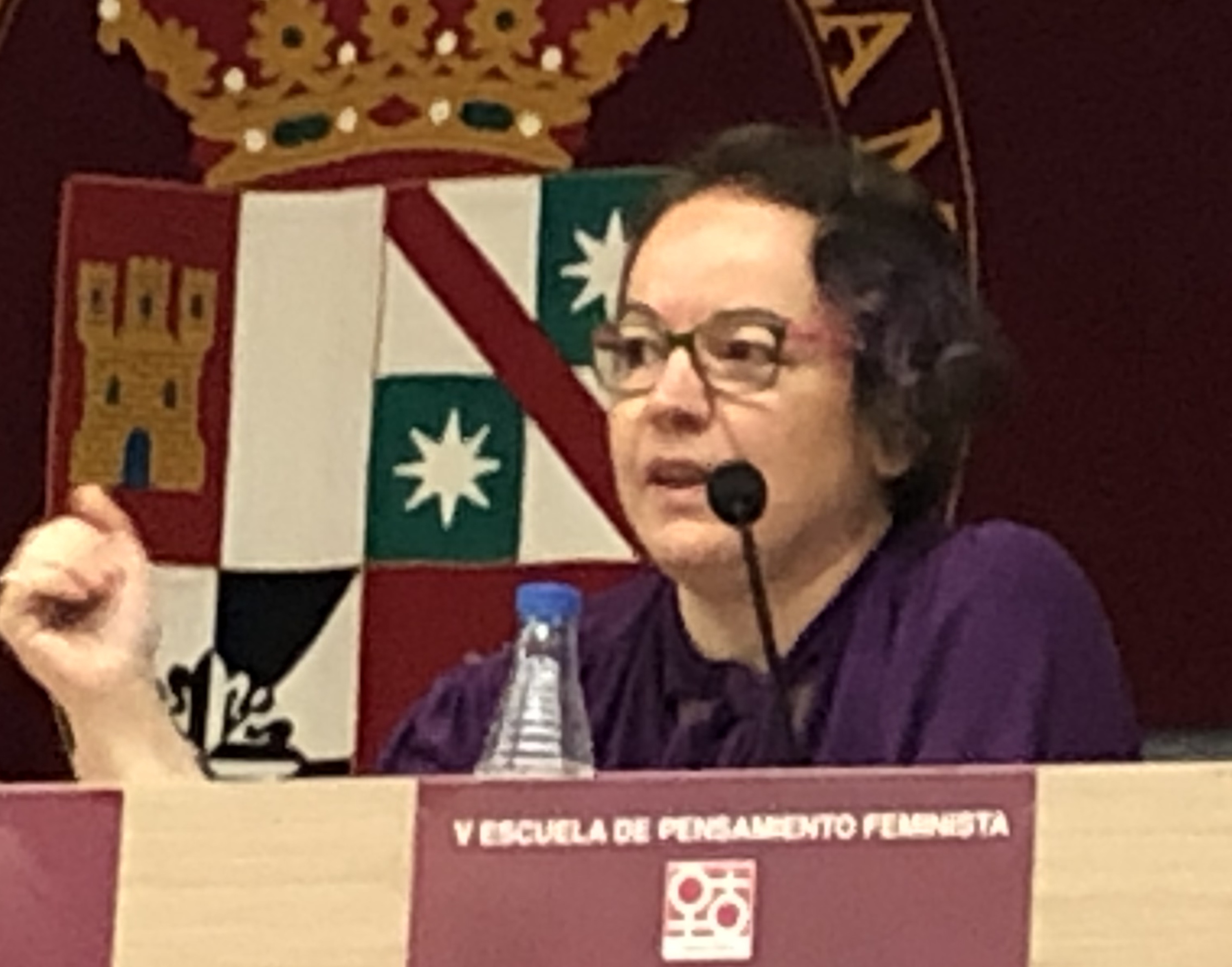 Inauguración V Escuela de pensamiento feminista Castilla-La Mancha